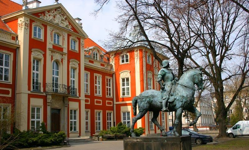 Warszawa (Polska)